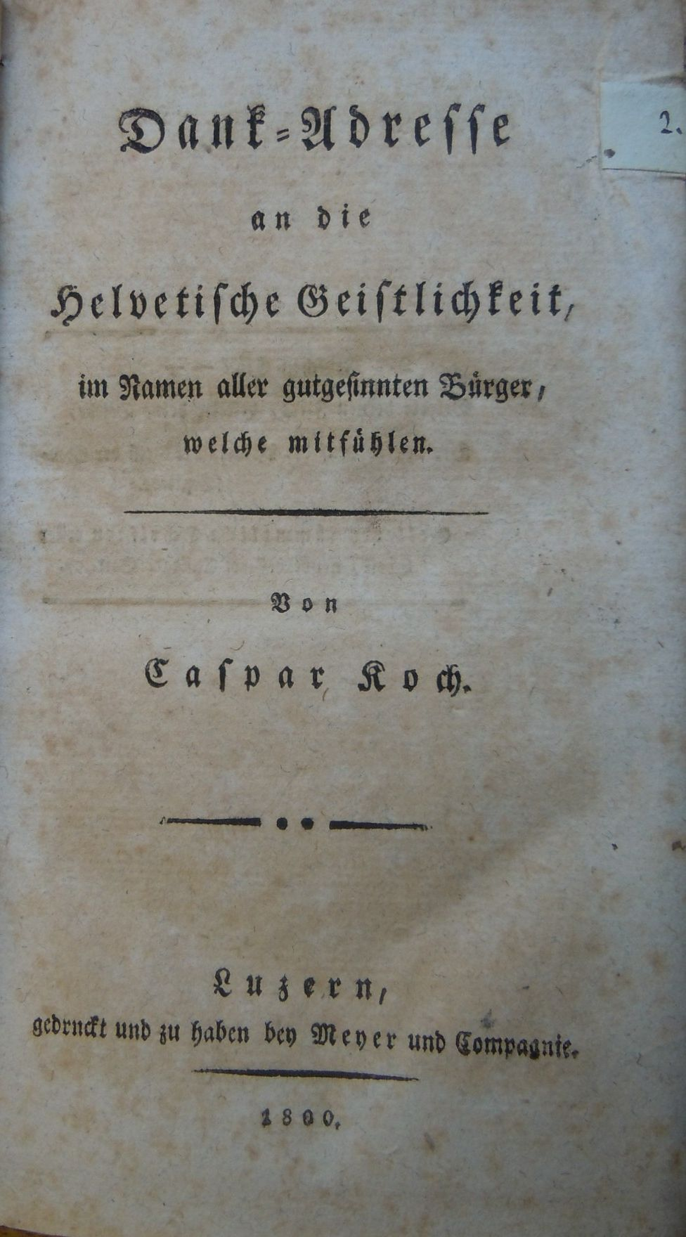 Titelblatt einer Flugschrift von Kaspar Koch 1800